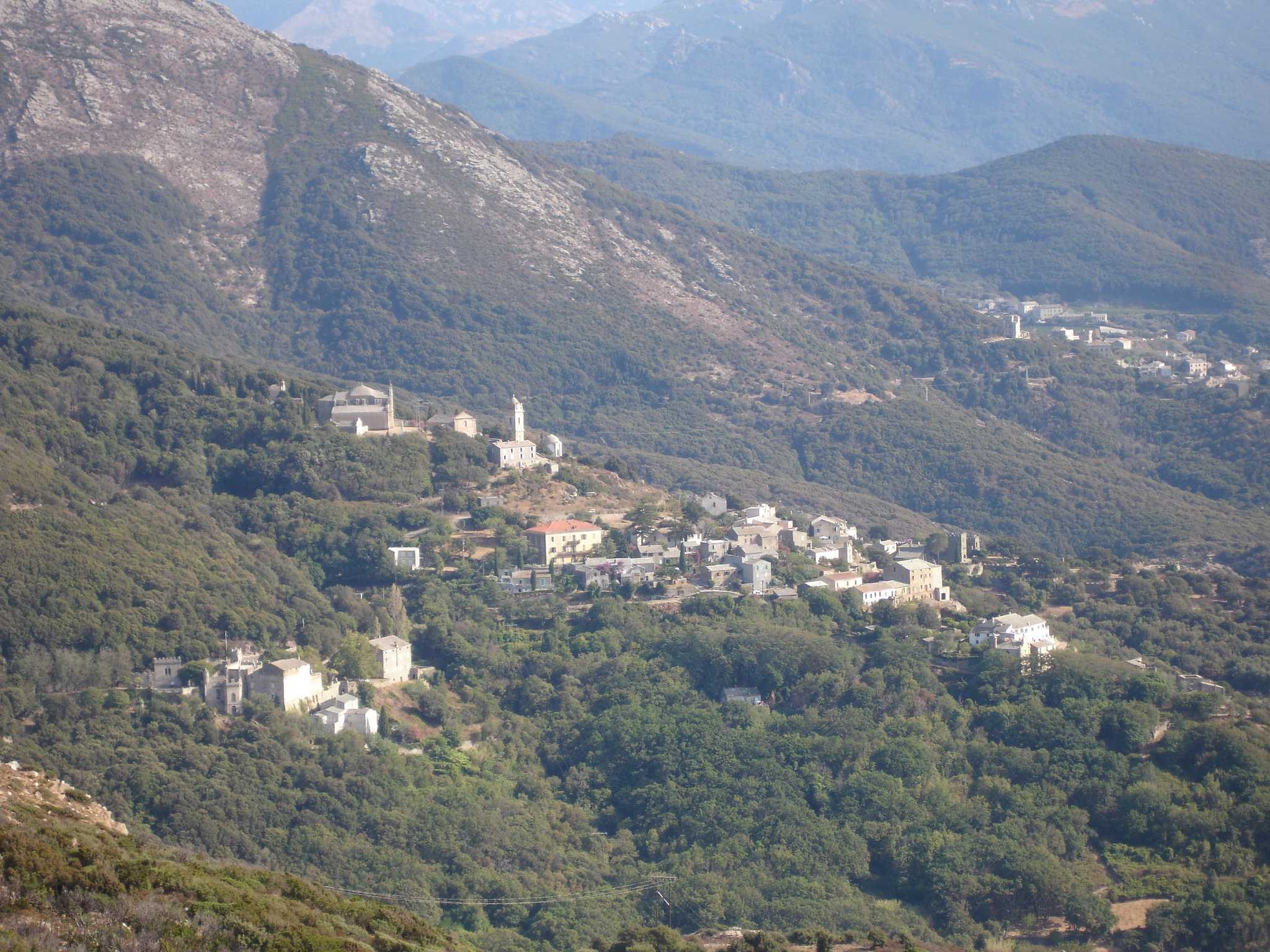 France, Haute-Corse (2B), Centuri, hameau de Camera